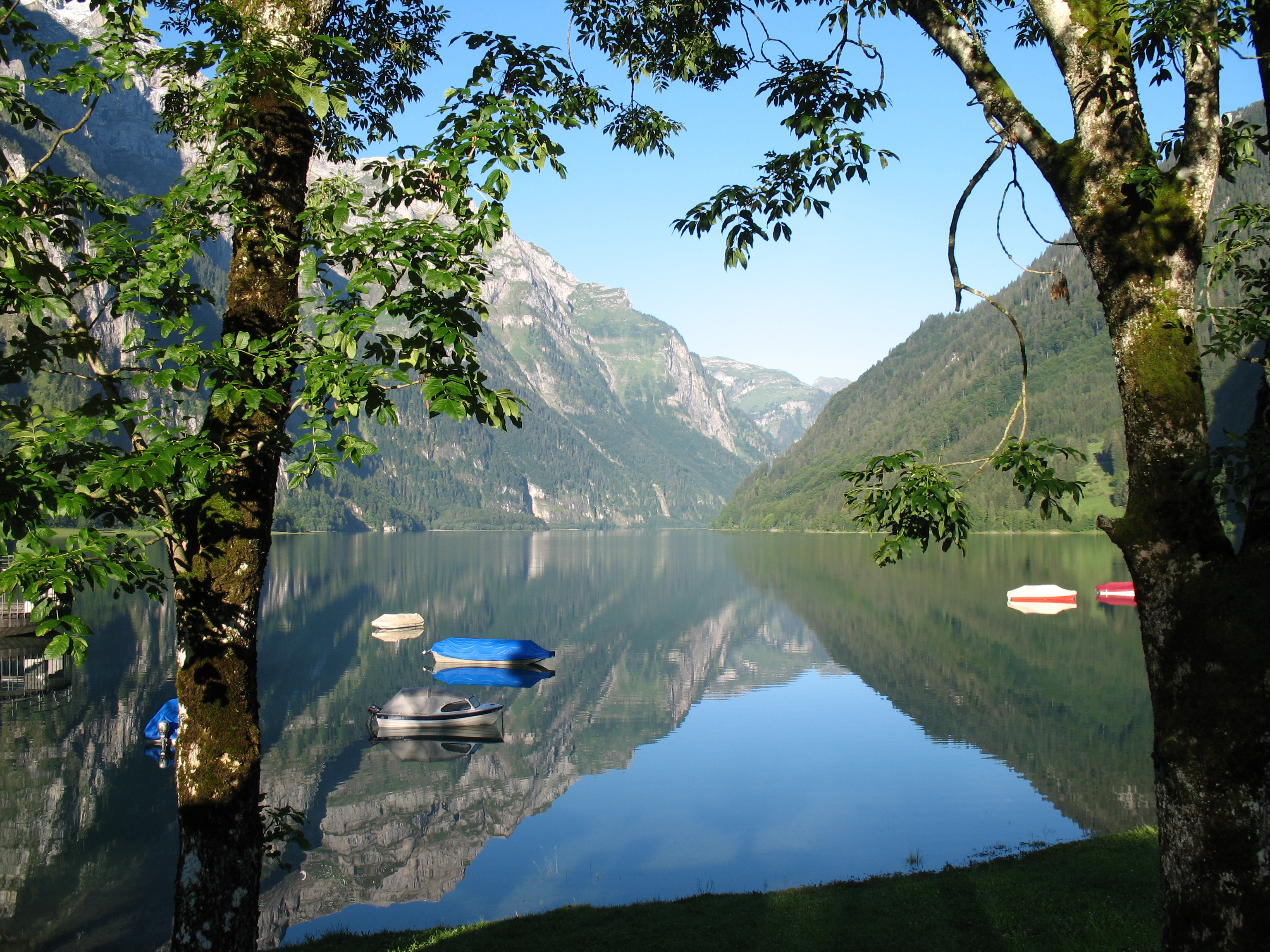 Spiegelung im Klöntalersee